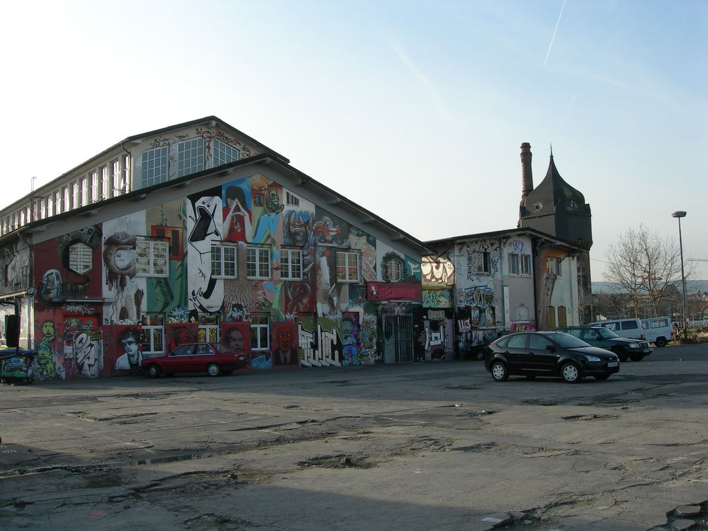 Kulturzentrum Schlachthof, Wiesbaden